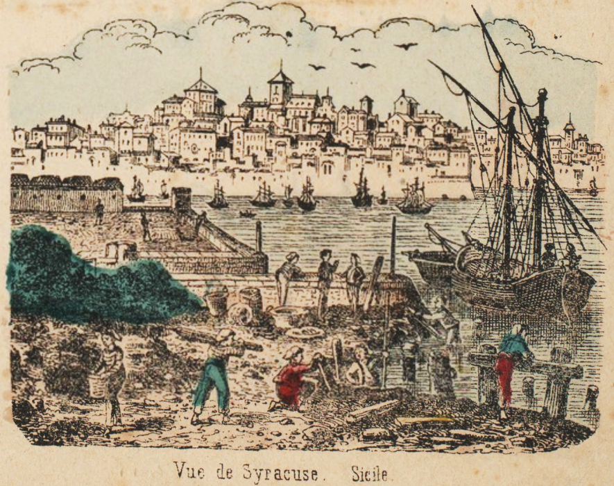 Vignettes of various European locations and San Francisco, California (Syracuse, Sicily)